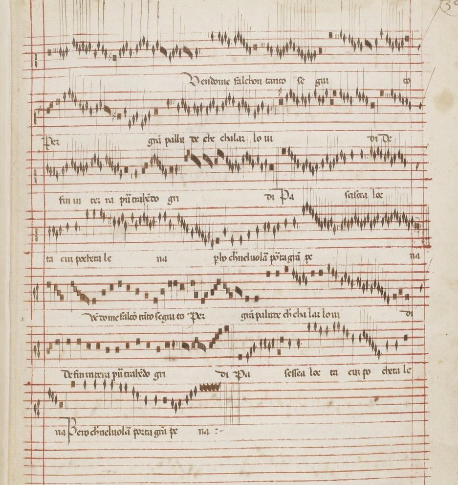 Codex Reina